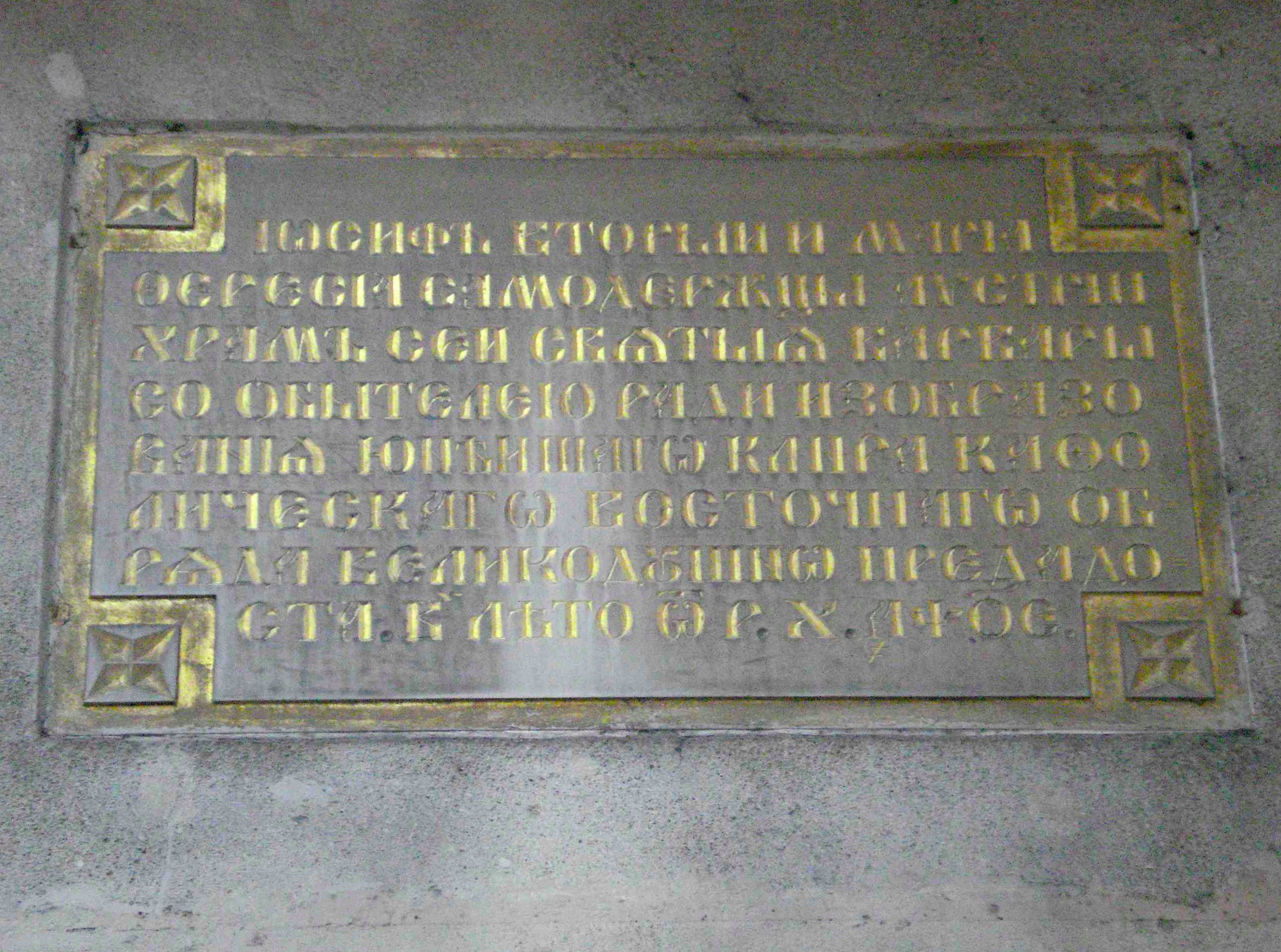 Gedenktafel an der Barbarakirche in Wien